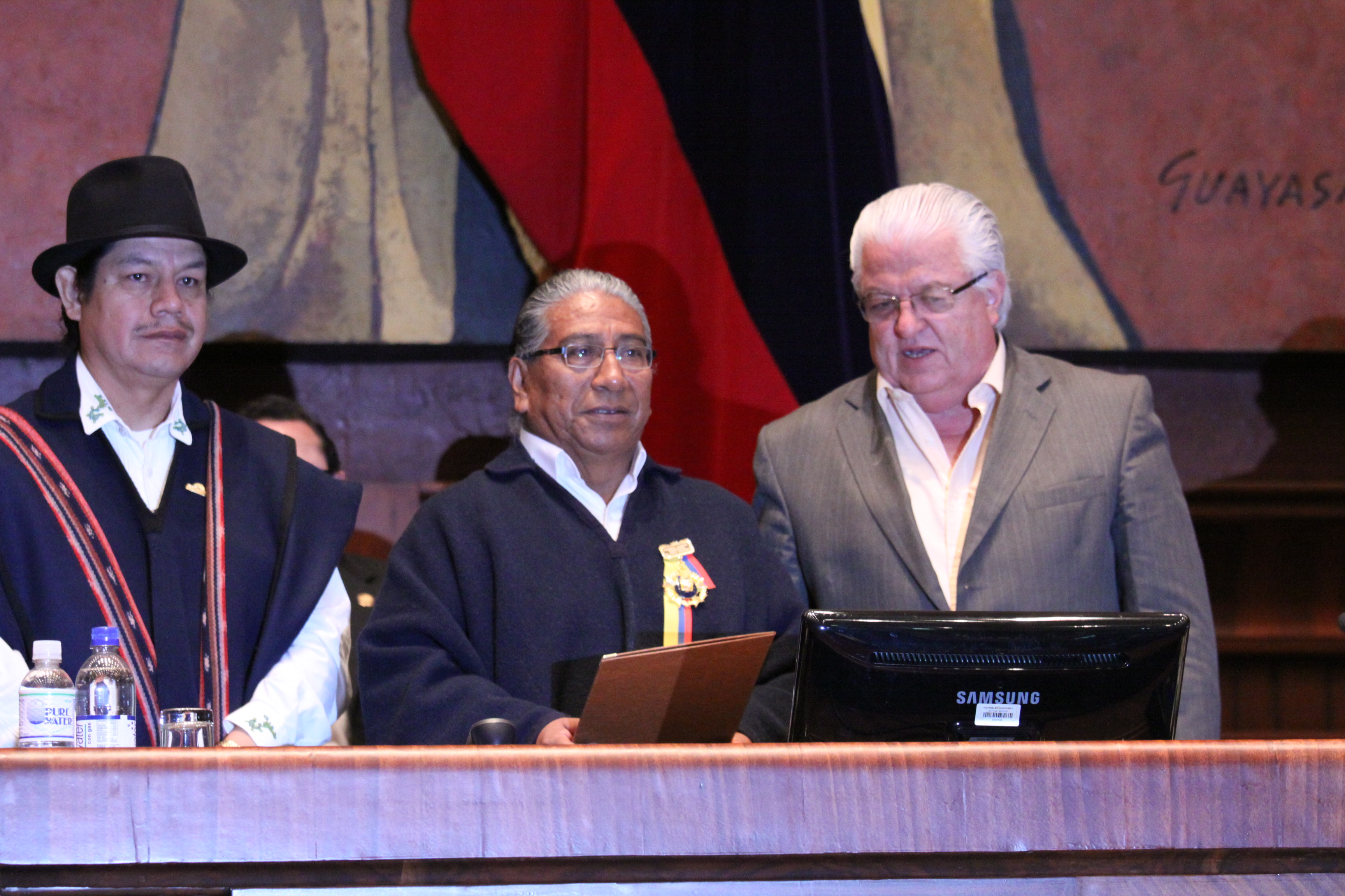 Foto: Hugo Ortiz Ron / Asamblea Nacional